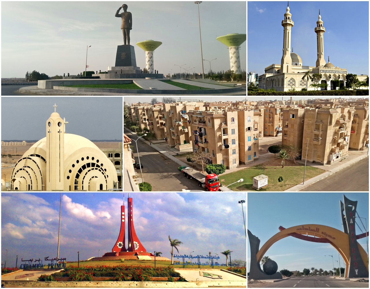 مدينة السادات، مصر